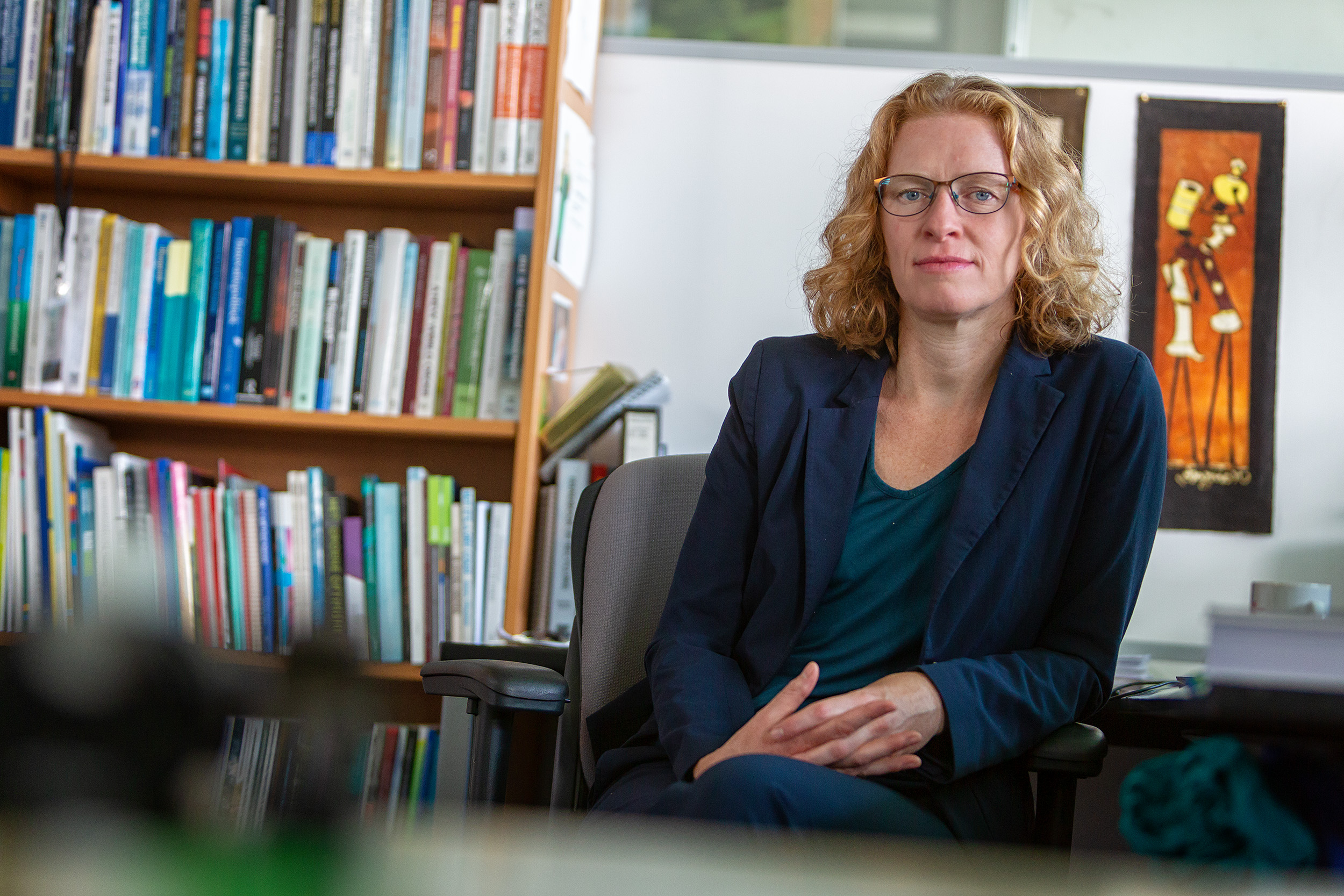 Heleen C. de Coninck (geb. 22. Januar 1977 in Wageningen) ist eine niederländische[1] Klimawissenschaftlerin. Sie ist Professorin (associate professor) an der Radboud-Universität Nijmegen.[2]